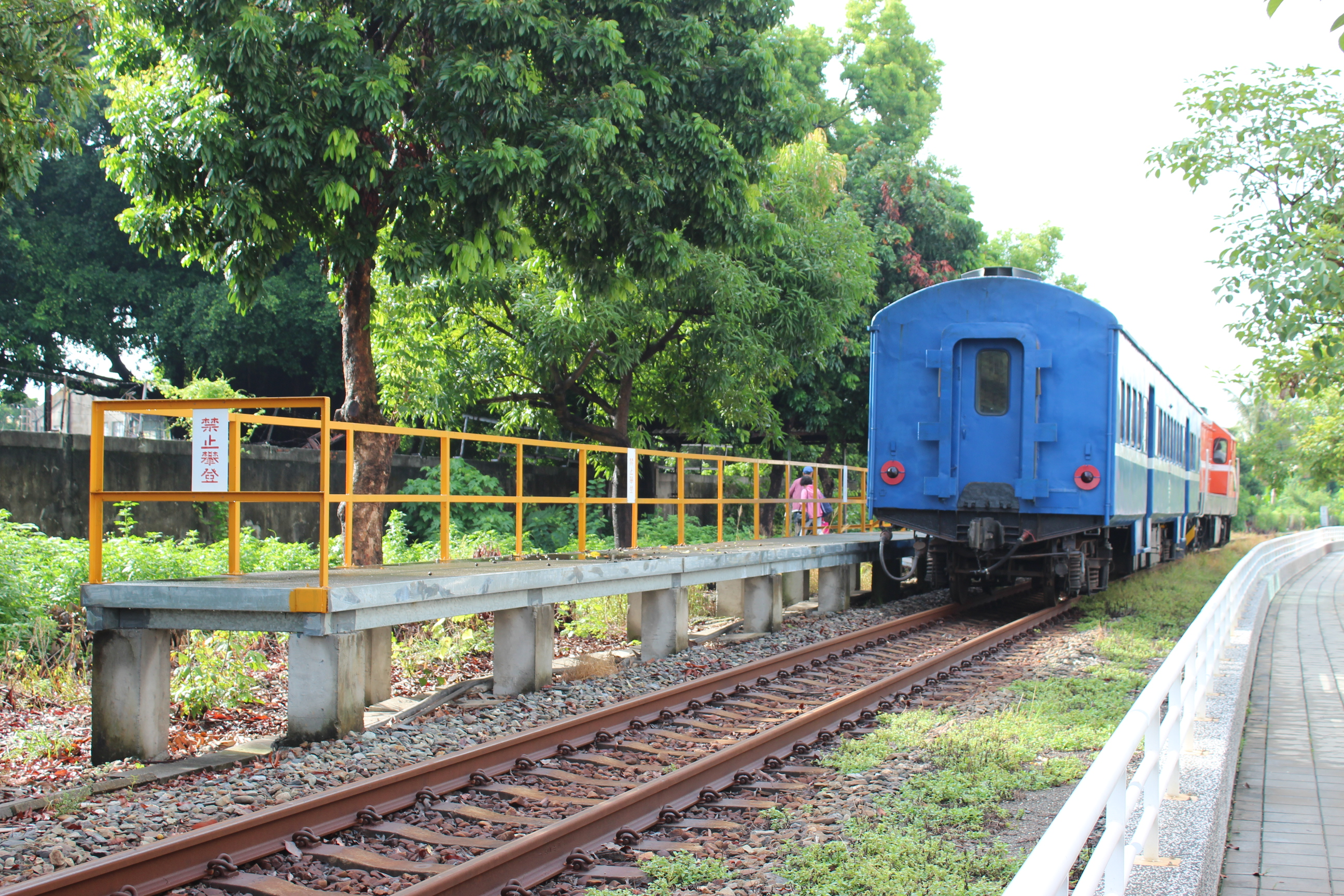 高雄臨港線 機廠駅